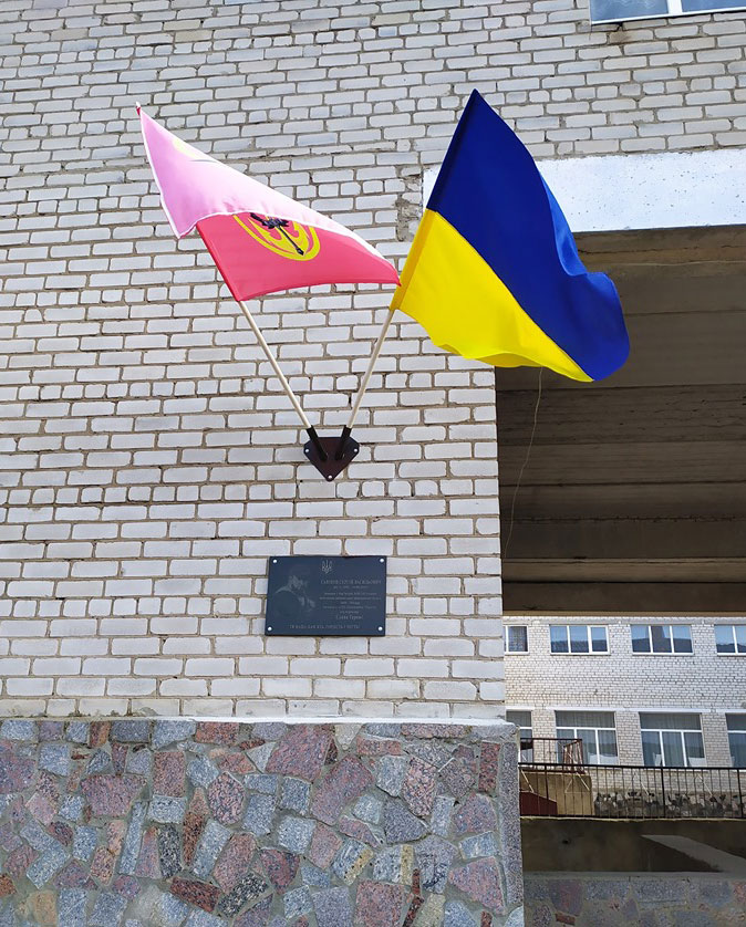 Открытие доски Савинову С.